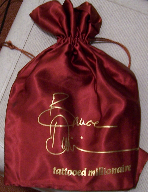 Geldbuidelzakje in gelimiteerde oplage van Bruce Dickinson, Tattooed Millionaire.